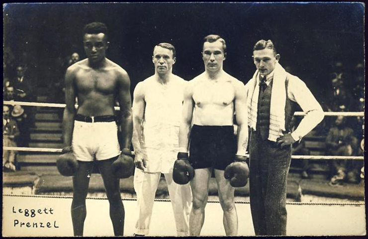 Foto-Ansichtskarte der Boxer Jimmy Lyggett Sr und des Kurt Prenzel mit weiteren Personen im Ring durch den Fotografen Alfred Grohs ...